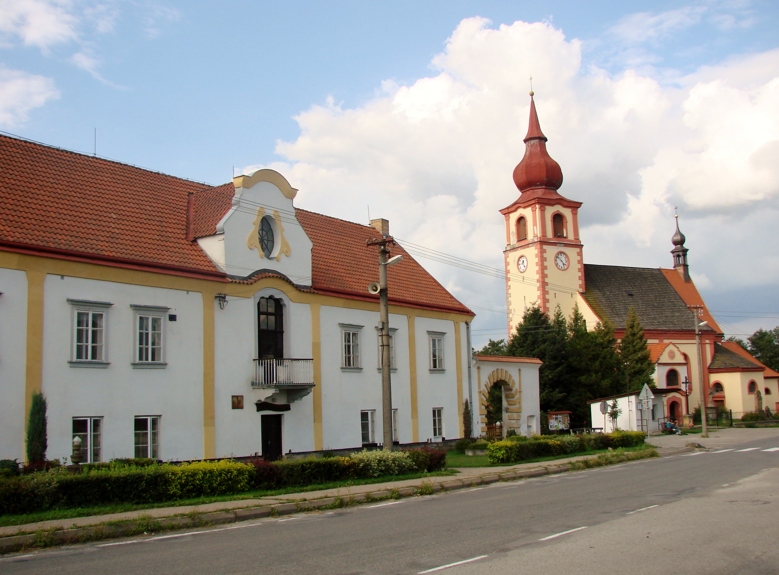 Zámek a kostel sv. Víta v Dolní Krupé, okres Havlíčkův Brod, Kraj Vysočina.